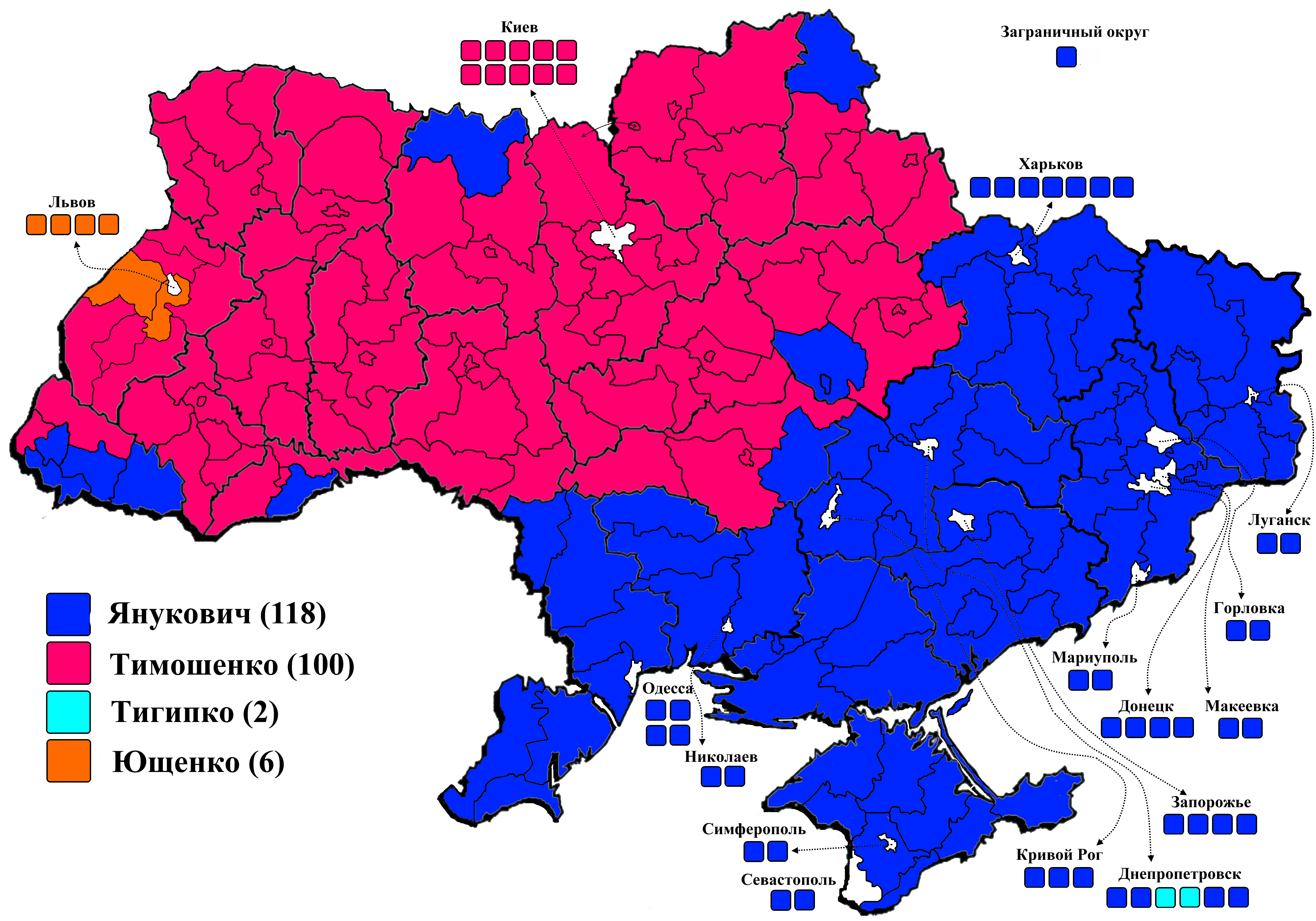 Первые места по округам. Первый тур.